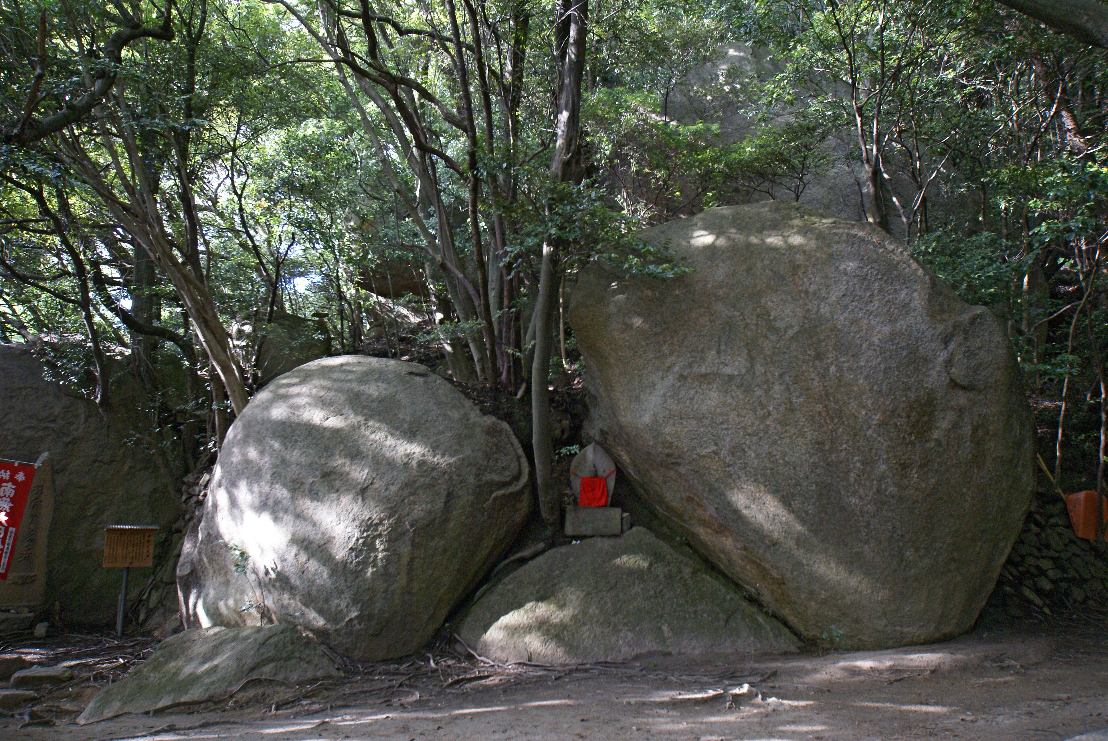 Shishikutsuji in Katano, Osaka prefecture, Japan